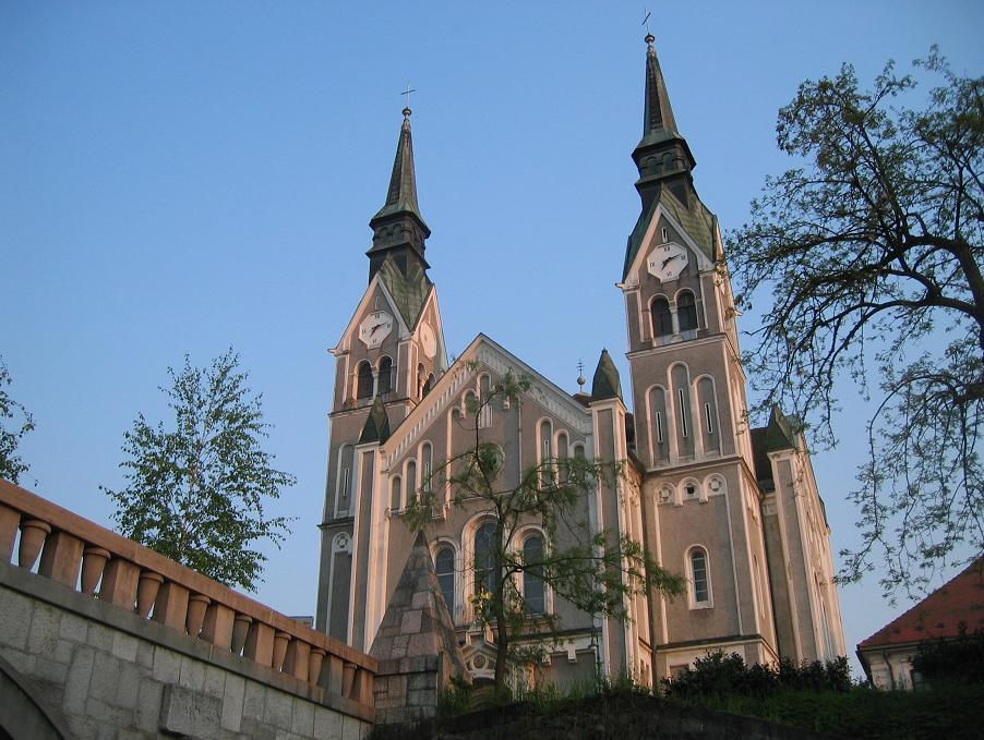 Trnovo church, Ljubljana photo:Ziga 17:49, 7 May 2006 (UTC)